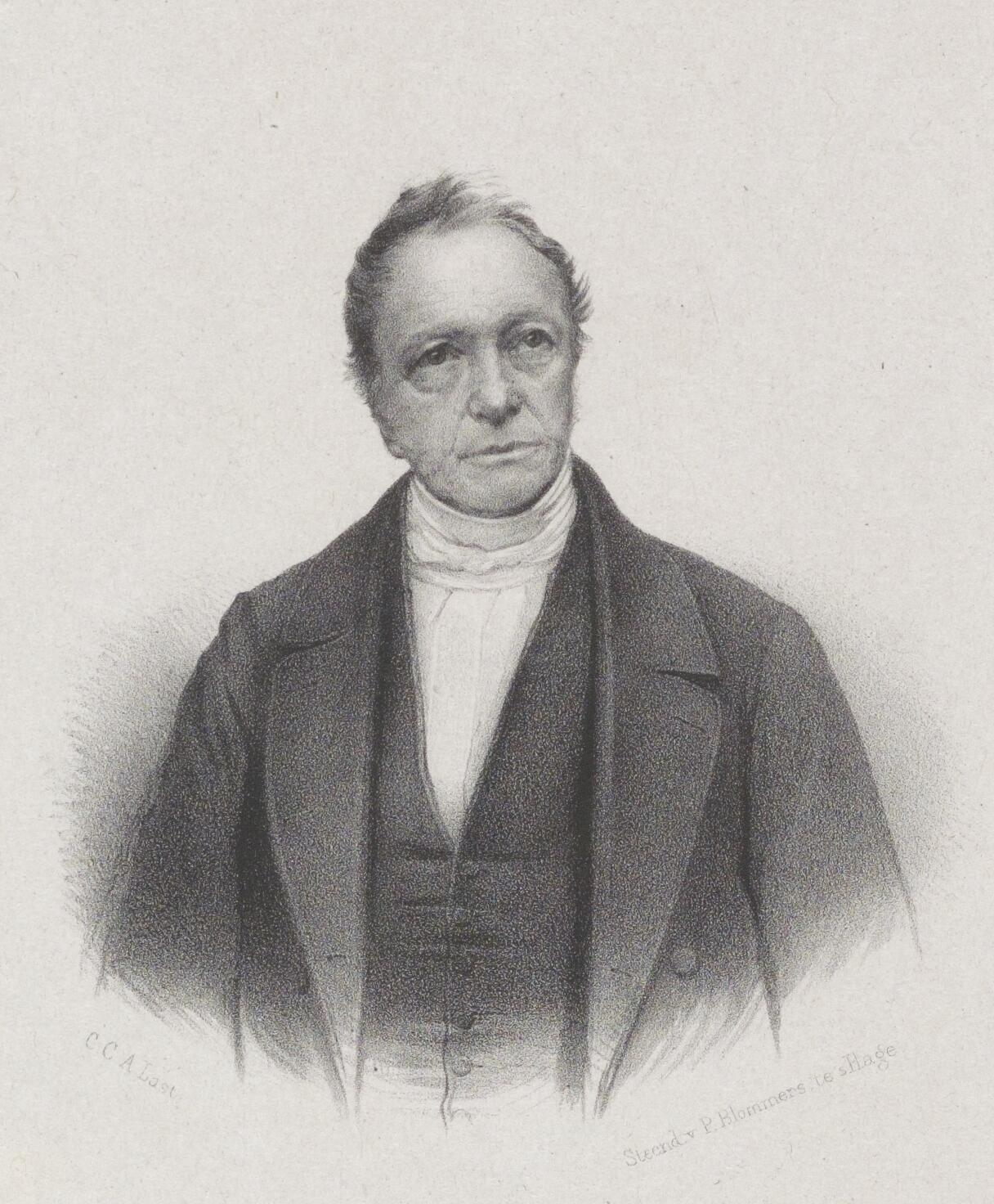 Jacob van Leeuwen, griffier fan it Provinsjaal Gerjochtshôf, argivaris-bibliotekaris fan de Provinsje Fryslân, berne yn 1787 te Nieuwkoop, ferstoarn yn 1857 te Ljouwert.